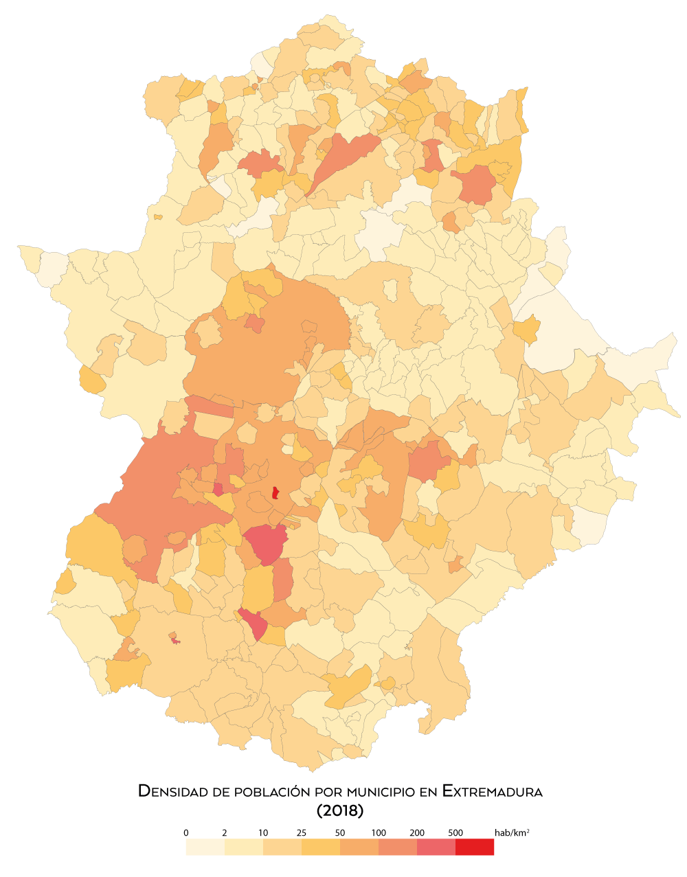 Densidad de población por municipio en Extremadura en 2018